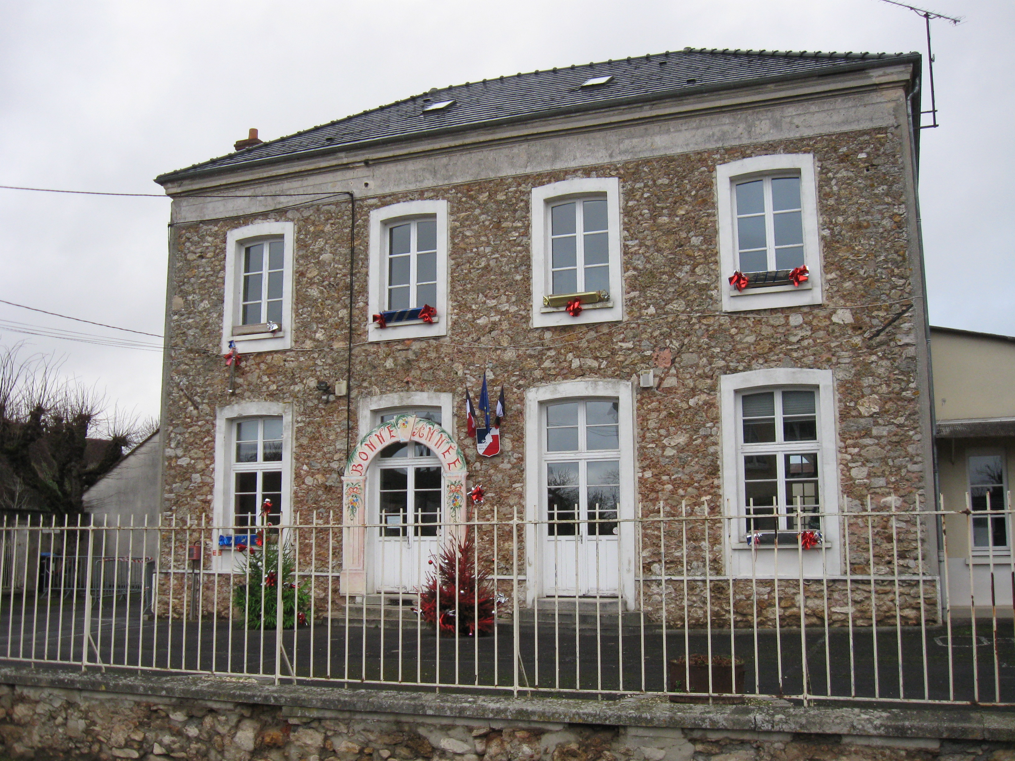 Mairie d'Armentières-en-Brie. (Seine-et-Marne, région Île-de-France).